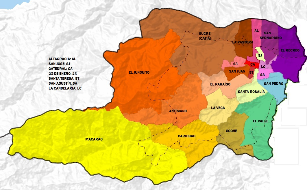 Mapa de las parroquias del Municipio Libertador de Caracas Venezuela con sus nombres